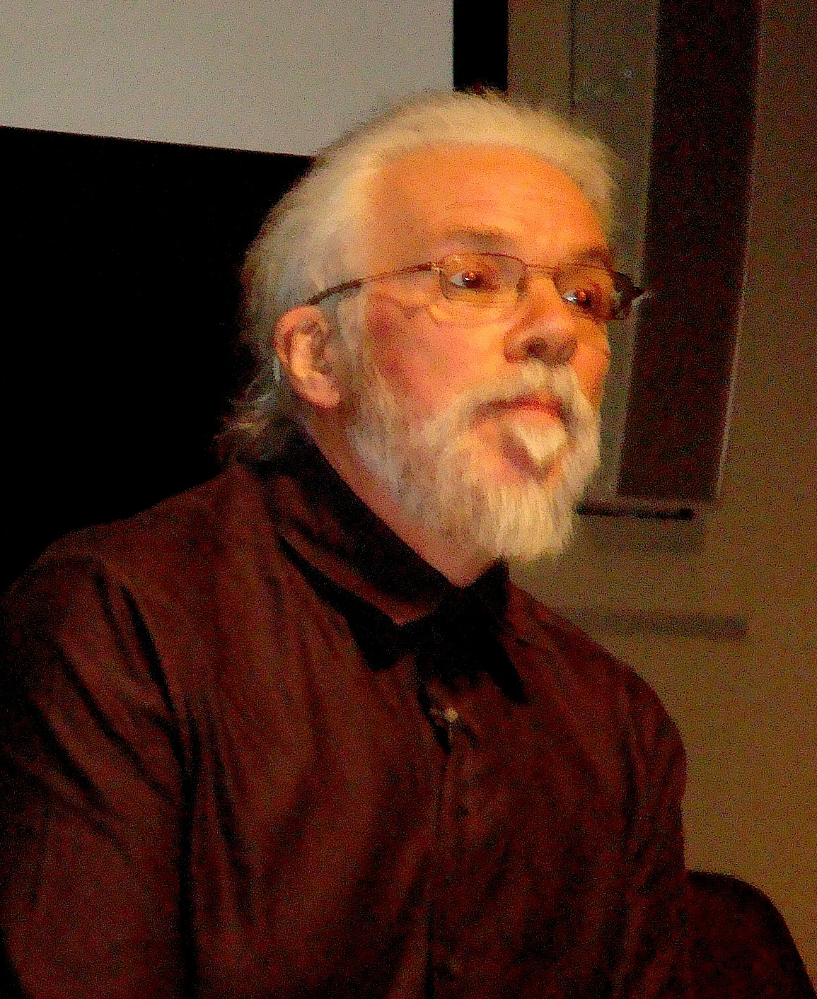 Noel Sharkey